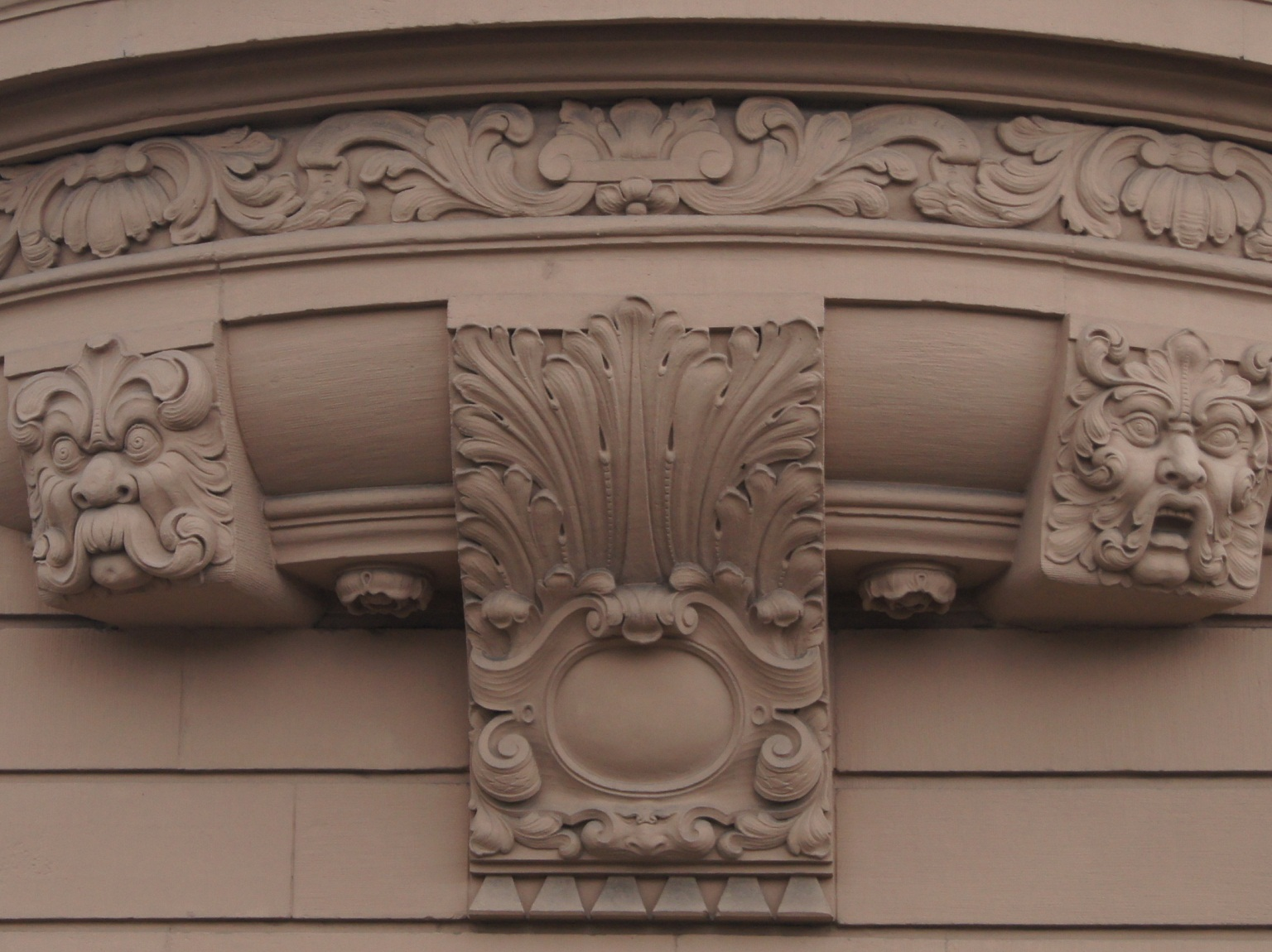 ehemaliges Hauptzollamt in Würzburg, Dekor am Eckturm